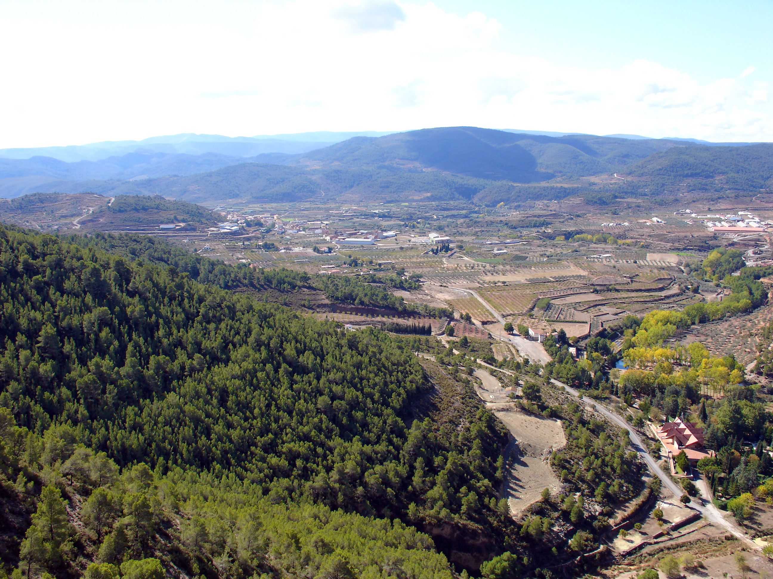 Vista de la comarca de Tuéjar (Valencia, España) desde el mirador de El Azud.